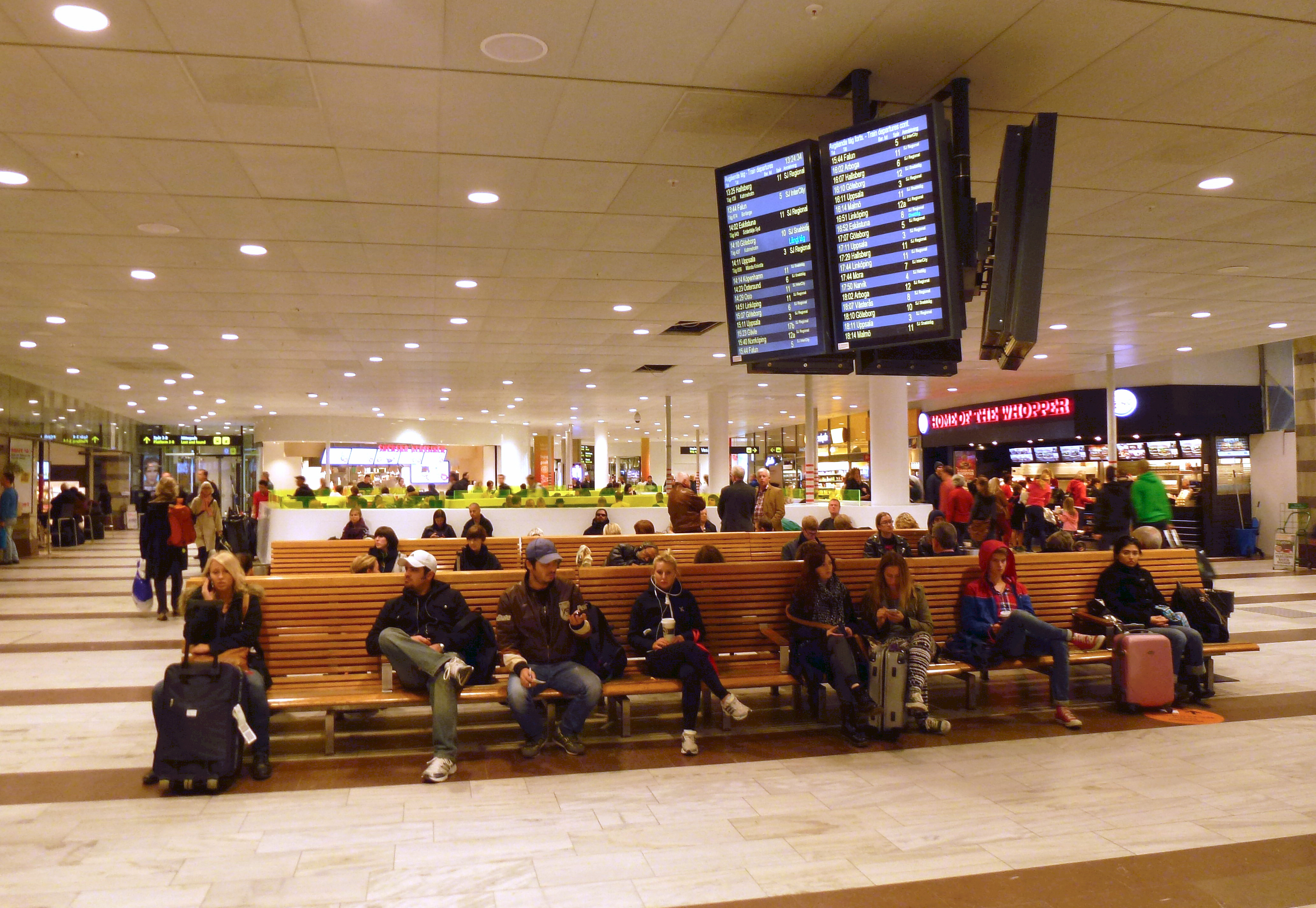 Stockholms central nya hallen mot norr